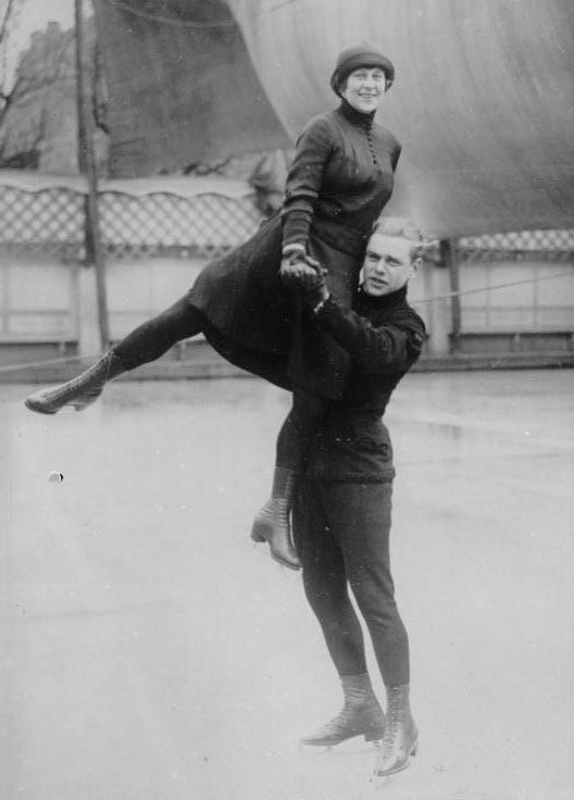 Olympia - Vorschau! Das oesterreichische Meisterpaar Frl. Lilli Scholz und Herr Otto Kaiser, Wien, gewannen in Davos siegreich das Paarlaufen.